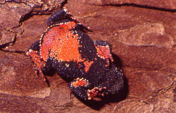 Melanophryniscus devincenzii